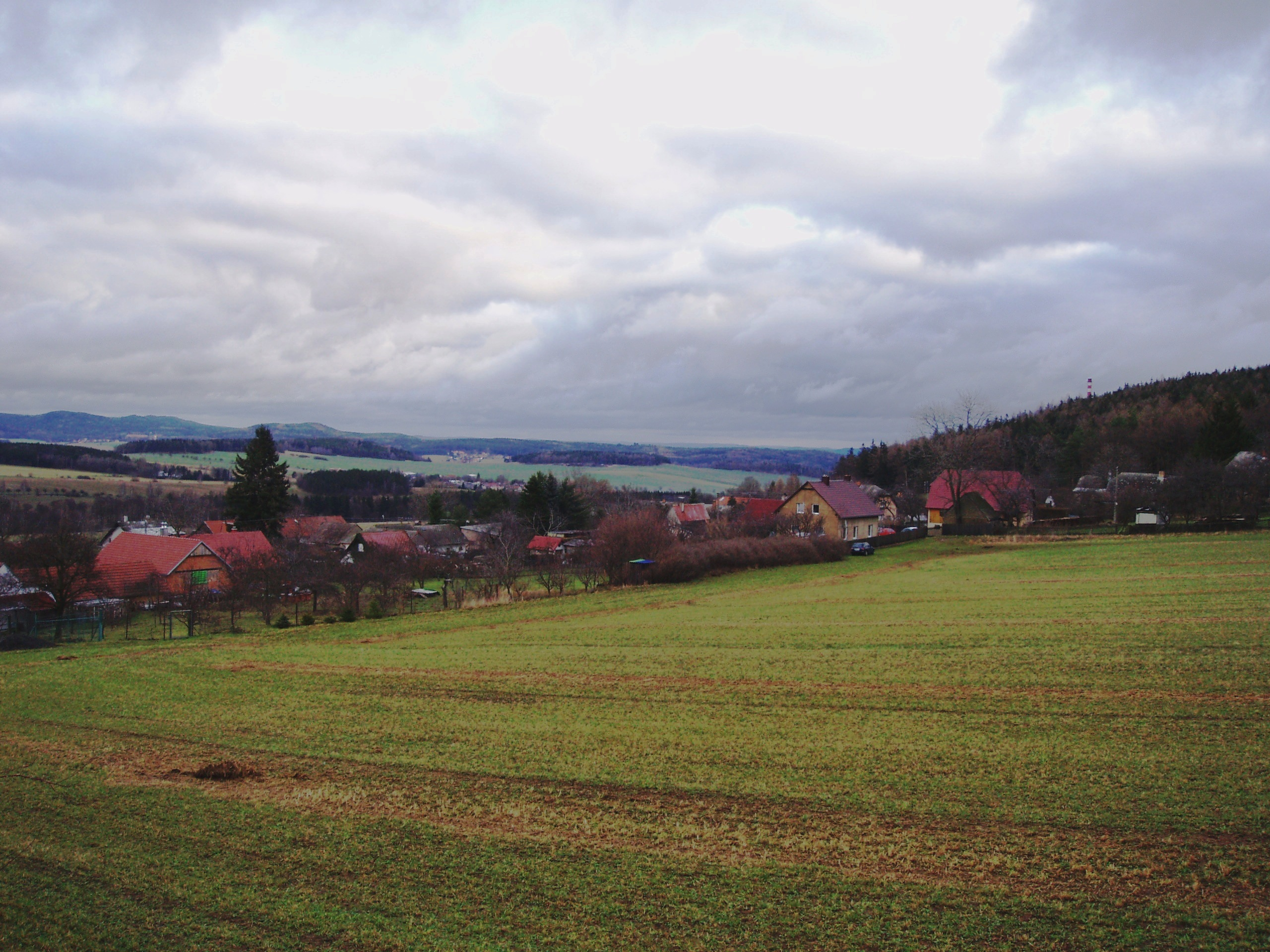 Podbrdská víska Oseč - celkový pohled